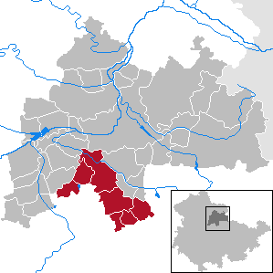 Verwaltungsgemeinschaft Gramme-Aue in Thuringia - District Sömmerda